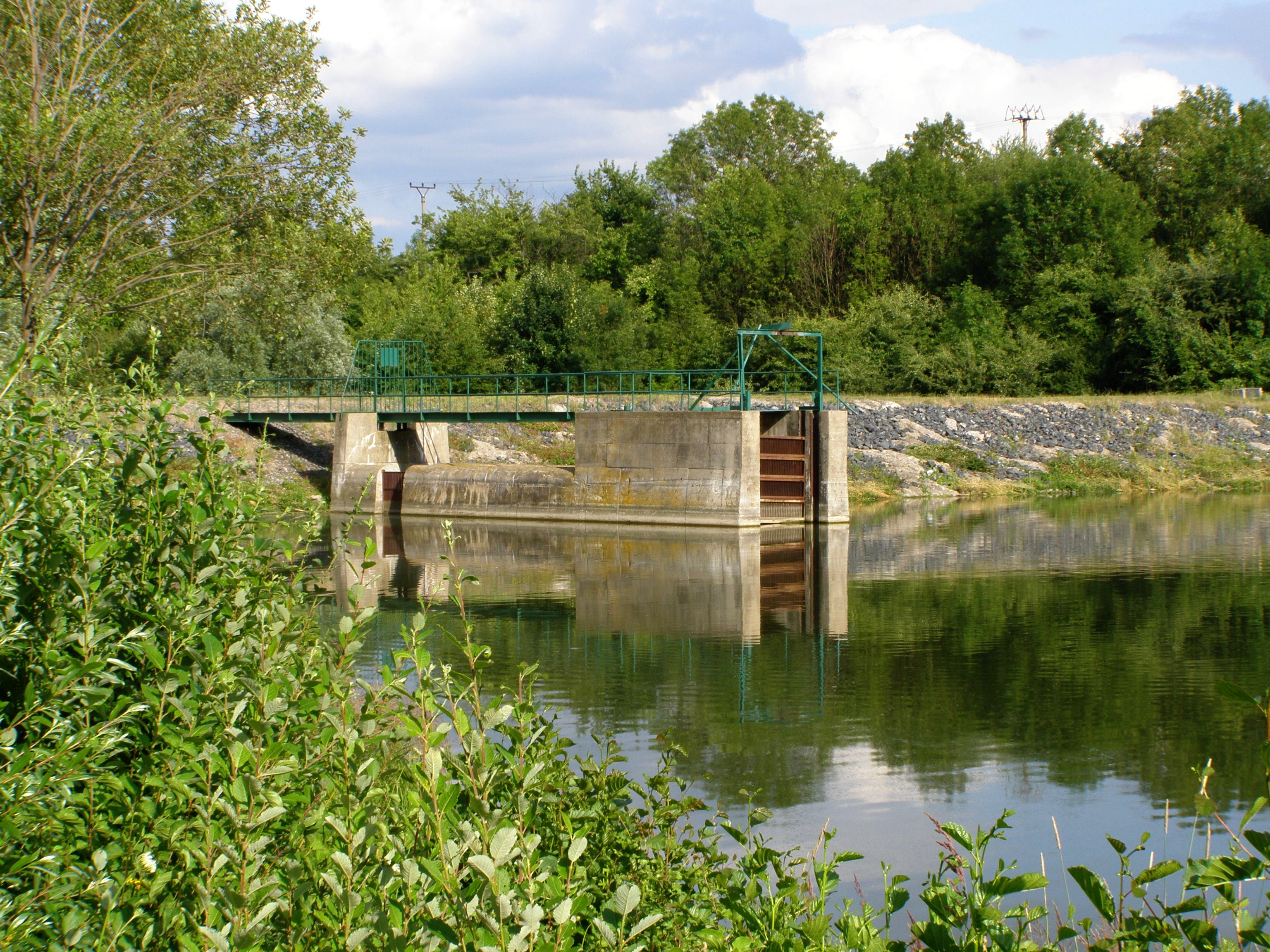 Česky: Kutná Hora, část Neškaredice, rybník Neškaredice, hráz